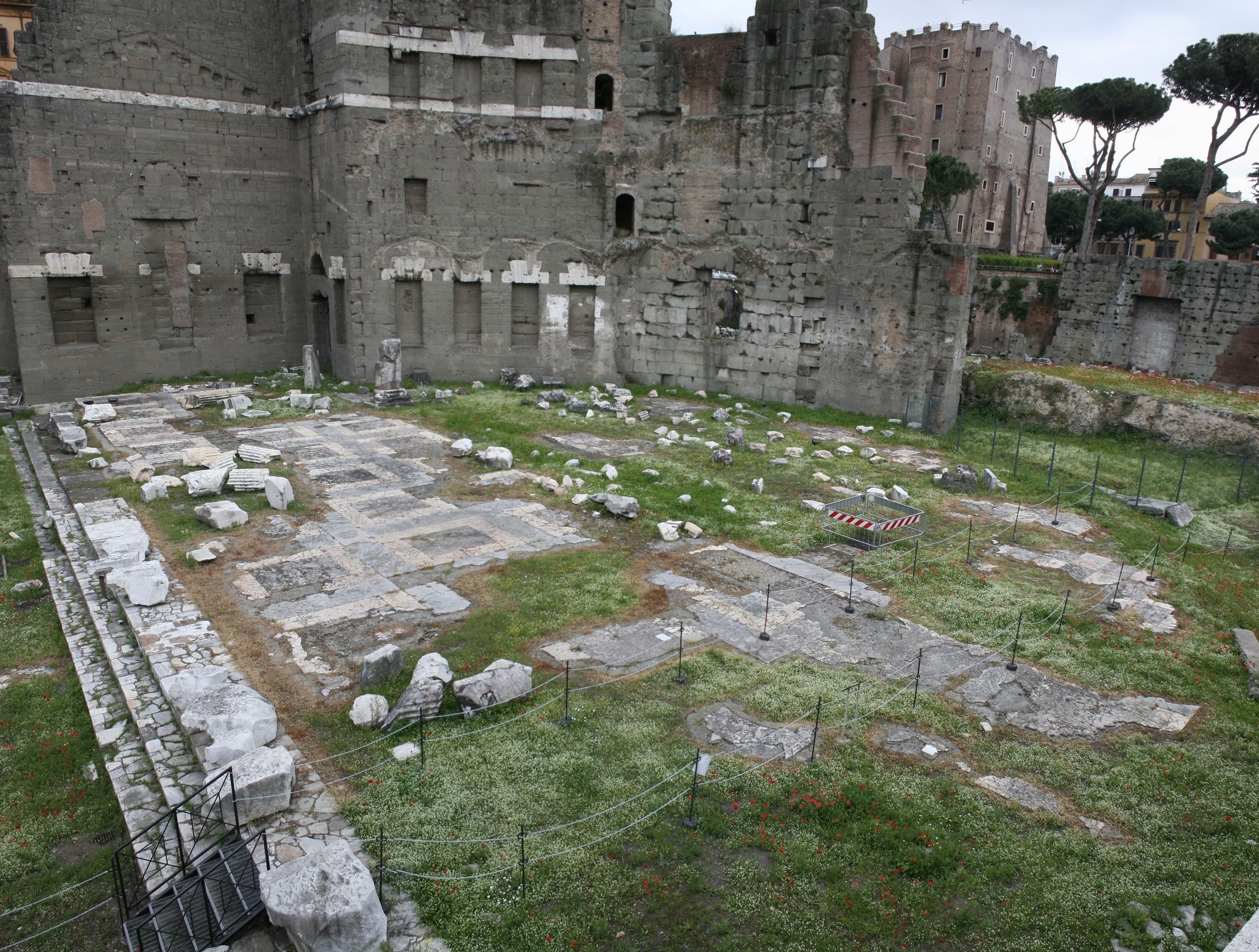 Exèdre orientale du Forum d'Auguste.